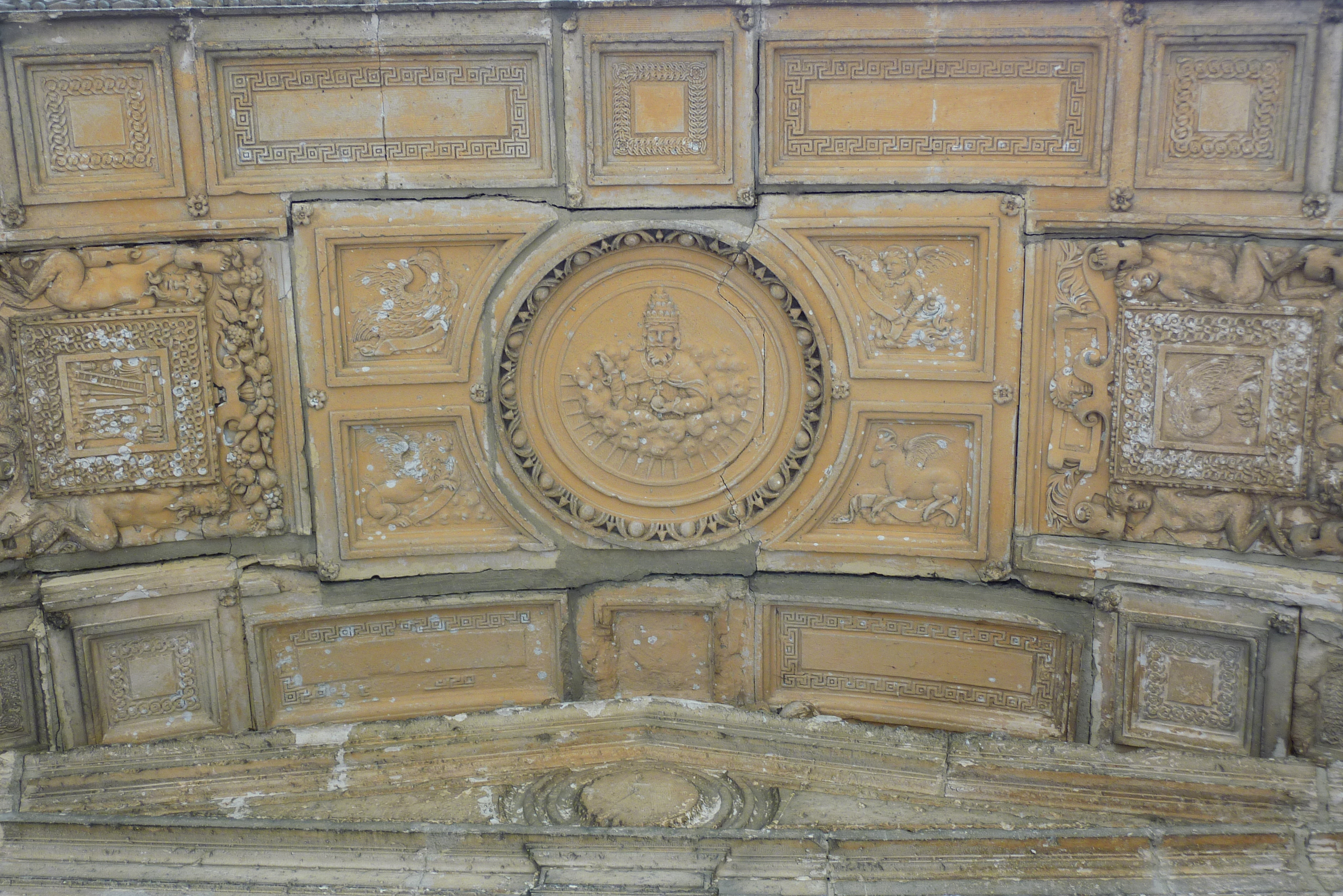 Katholische Kirche Saint-Côme-et-Saint-Damien in Luzarches, einer Gemeinde im Département Val-d'Oise (Île-de-France), Renaissancedekor an der Bogenlaibung des Eingansportals, Darstellung (in der Mitte): Gottvater umgeben von den Evangelistensymbolen